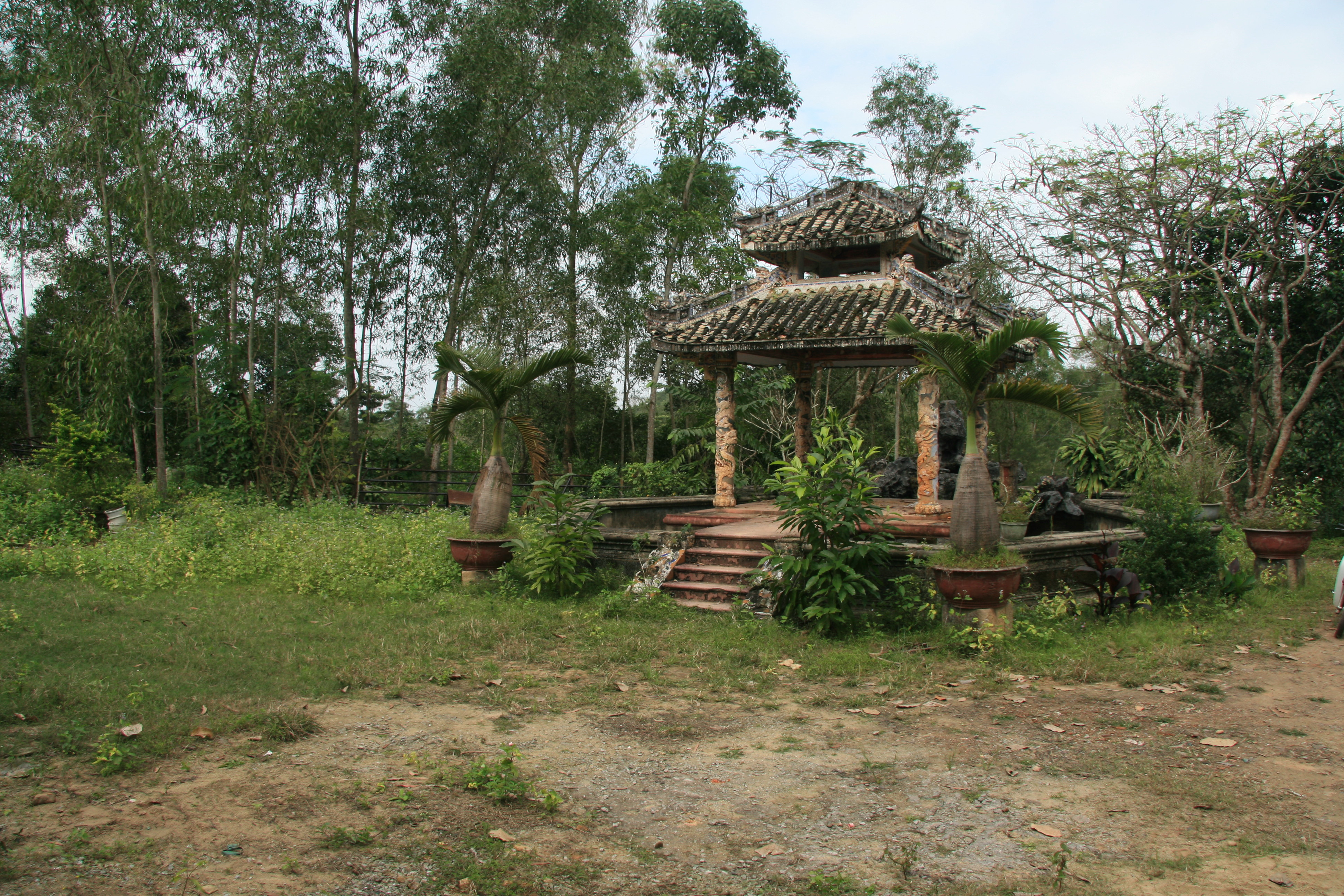 Chứng tích biệt thự Ngô Đình Cẩn tại Ngũ Tây, Thuỷ An, thành phố Huế